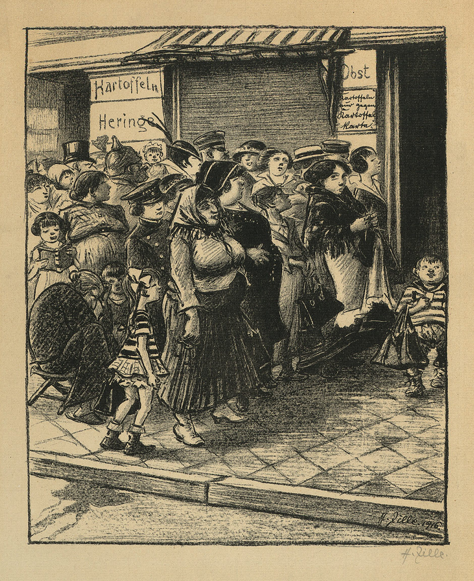 Heinrich Zille: Kartoffelstehen, Lithographie, 26 x 21,2 cm (Darstellung); 1916 Aus "Der Bildermann", 20. Mai 1916, 1. Jg, Nr. 12